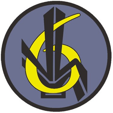 Oznaka rozpoznawcza na mundur wyjściowy 6 batalionu chemicznego Sił Powietrznych